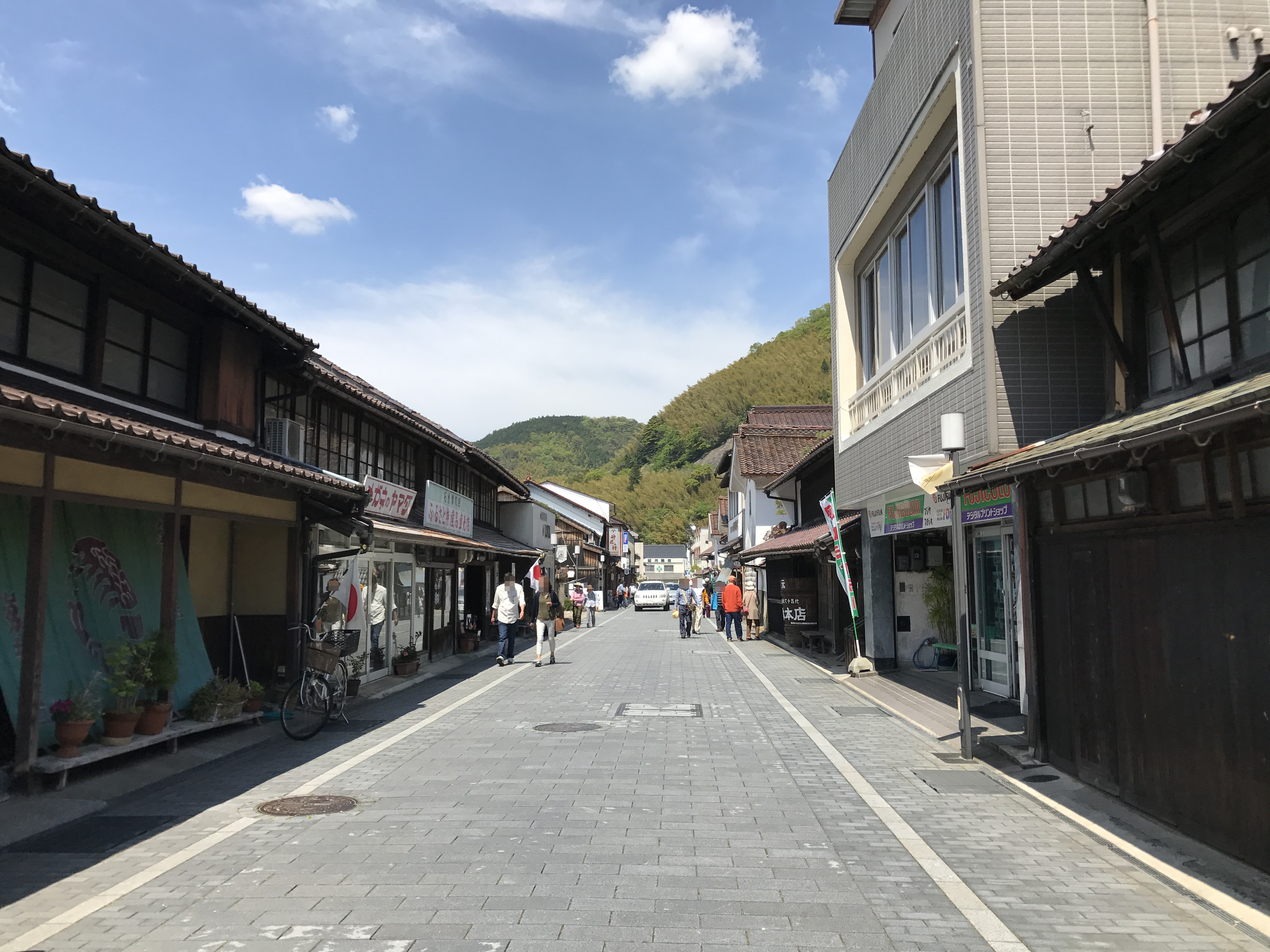 島根県鹿足郡津和野町・本町通り